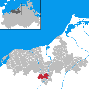 Schwaan in Mecklenburg-Western Pomerania - District Bad Doberan